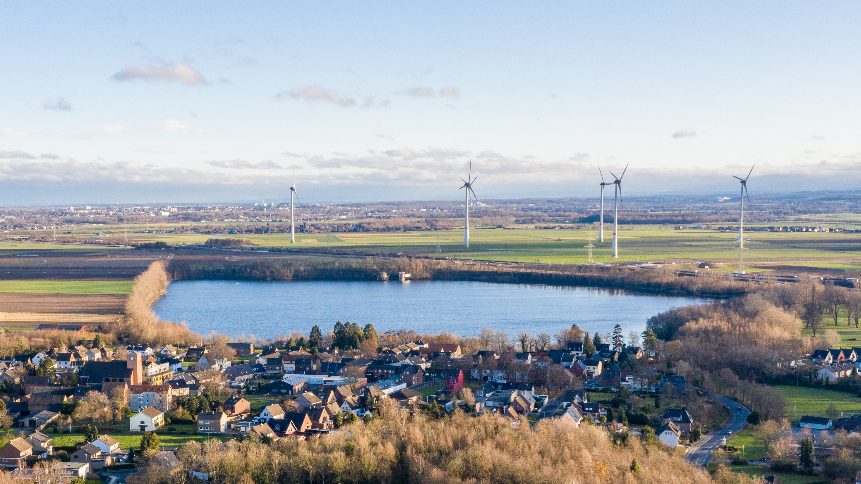 Luftaufnahme Lucherberg und Lucherberger See